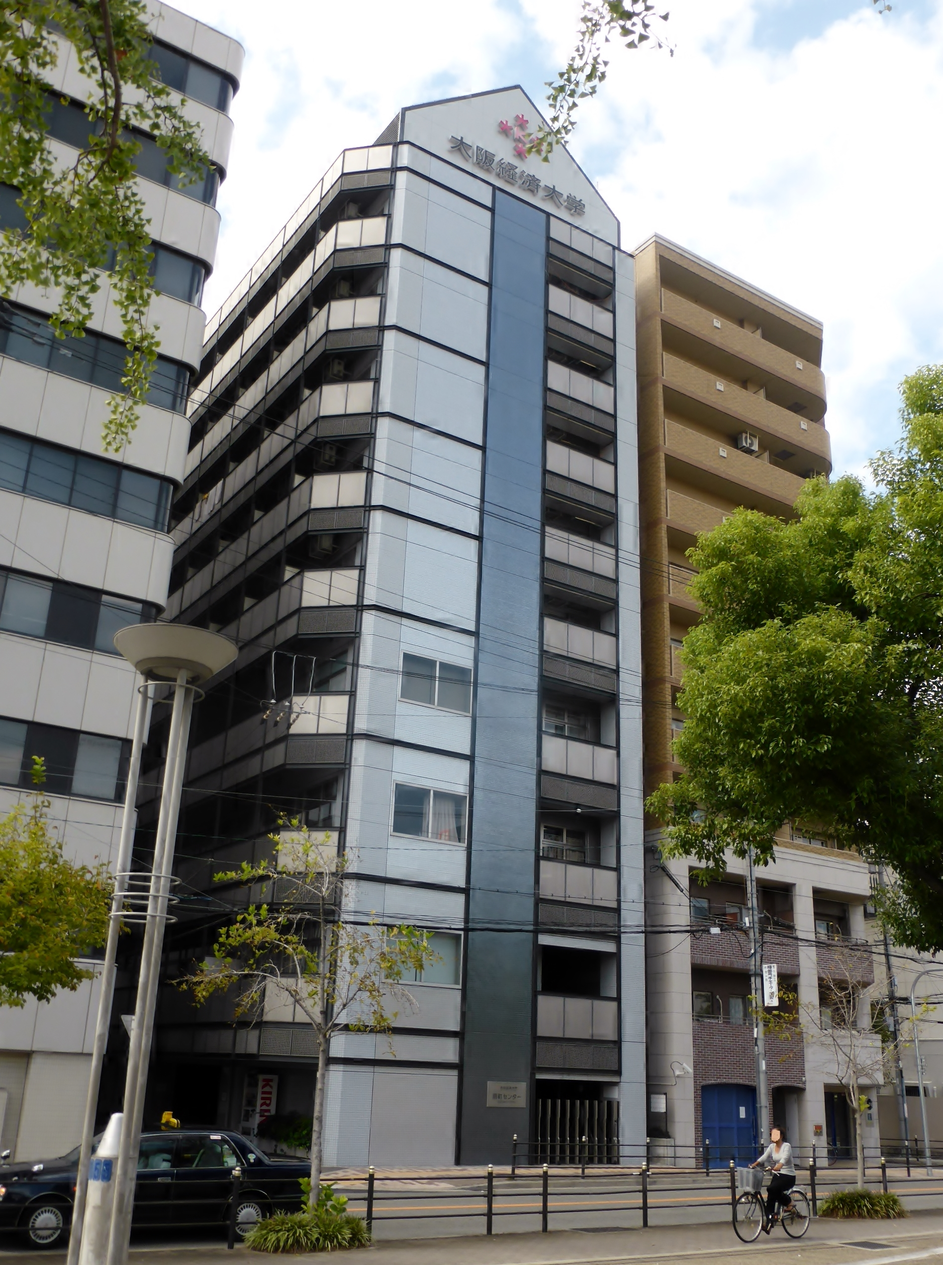 大阪経済大学扇町センターを撮影。